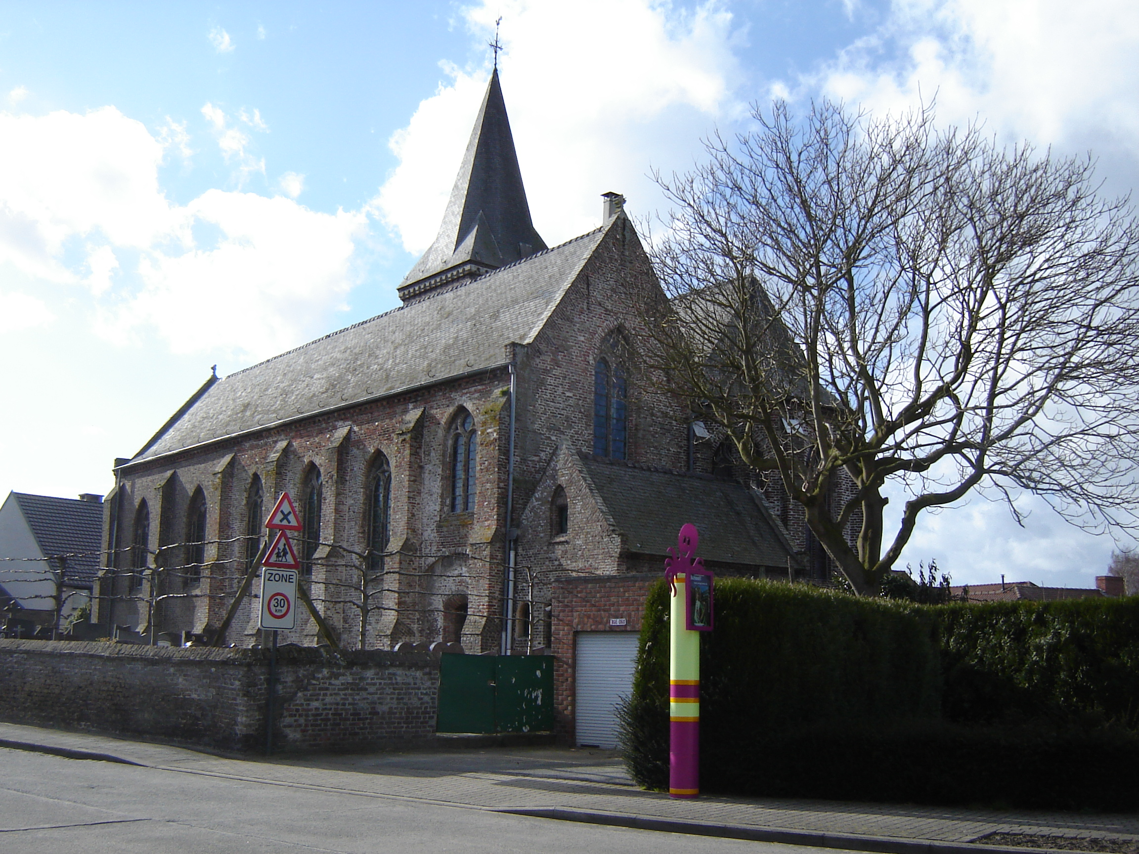 Sint-Vedastuskerk in Zerkegem Church of Saint Vedastus in Zerkegem, Jabbeke, West Flanders, Belgium